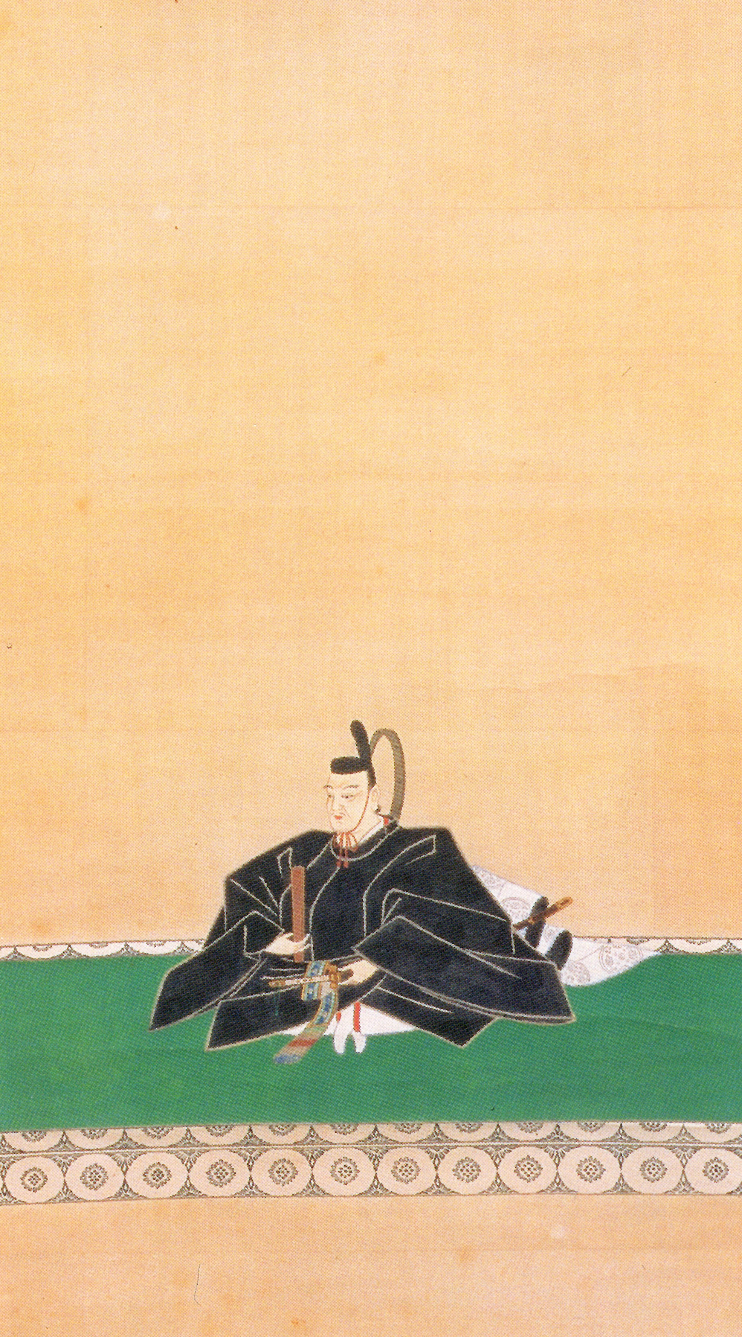 板倉重矩の肖像。